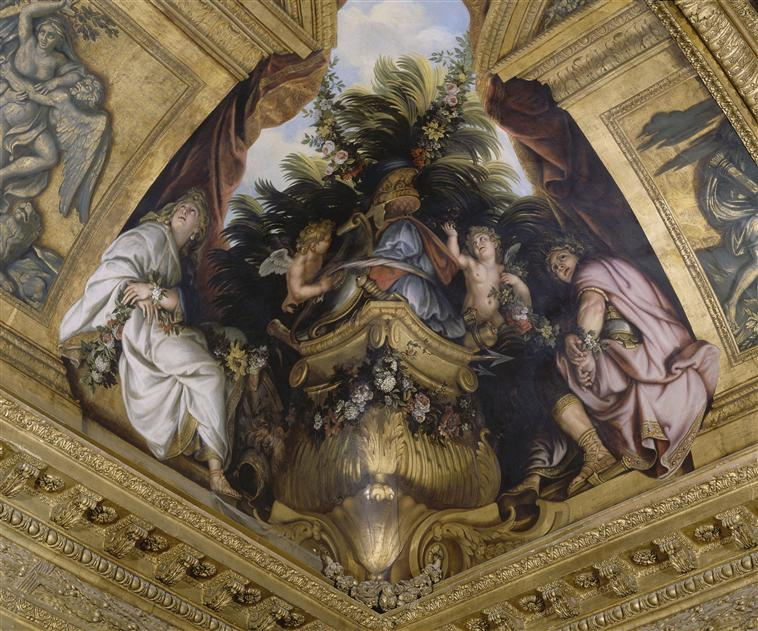 TITUS ET BERENICE ; Salon : Salon de Vénus, Grands appartements du Château de Versailles Emplacement : écoinçon angle ; sud-ouest